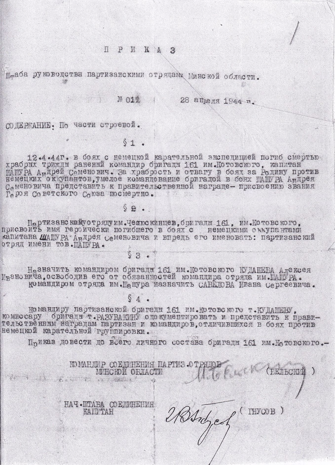 Приказ относительно кадровых перестановок в 161-ой партизанской бригаде имени Котовского